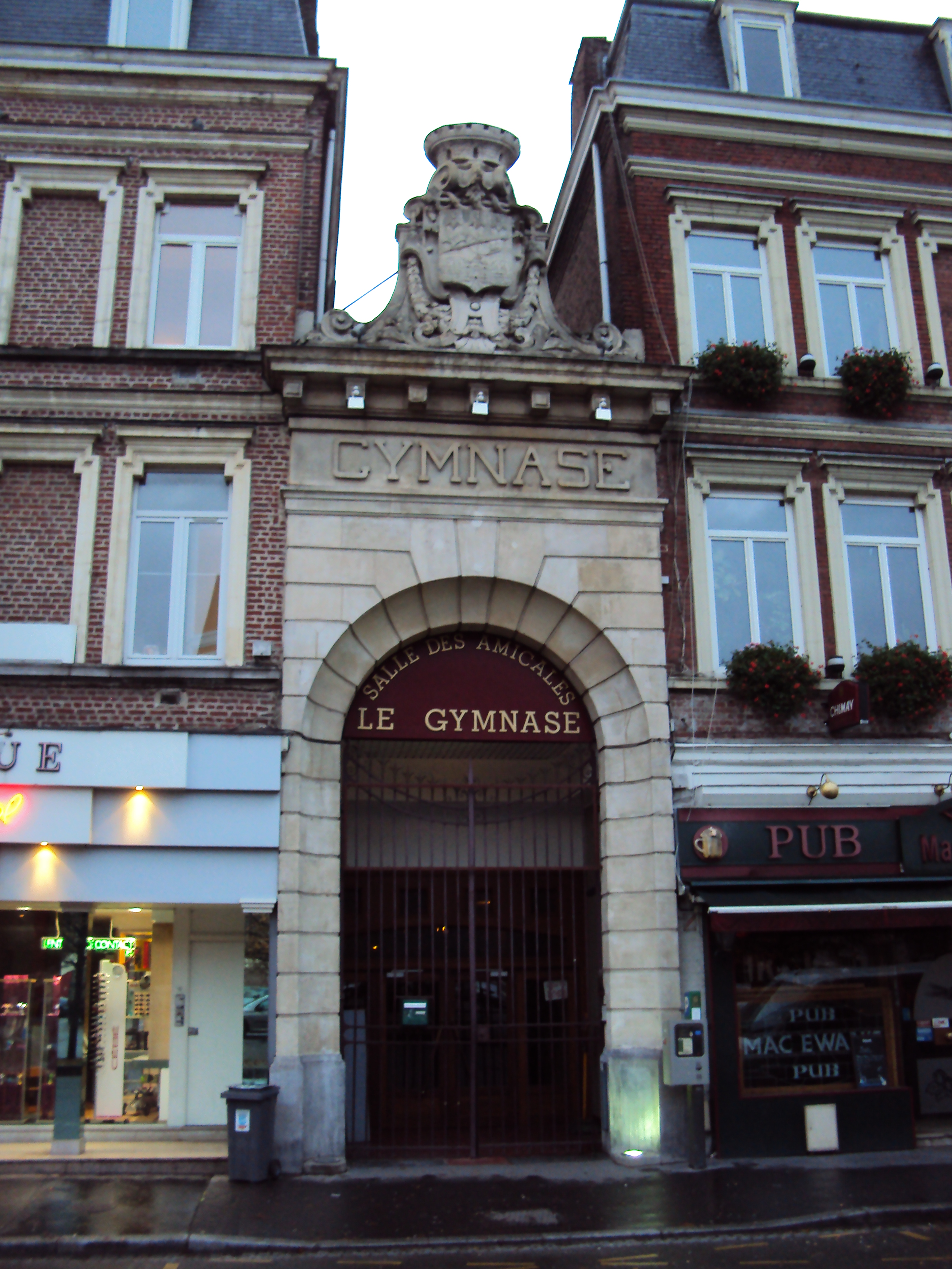 Façade de la salle dite du "Gymnase"; ancienne salle de sport lilloise reconvertie et dédiée aux salons et expositions.